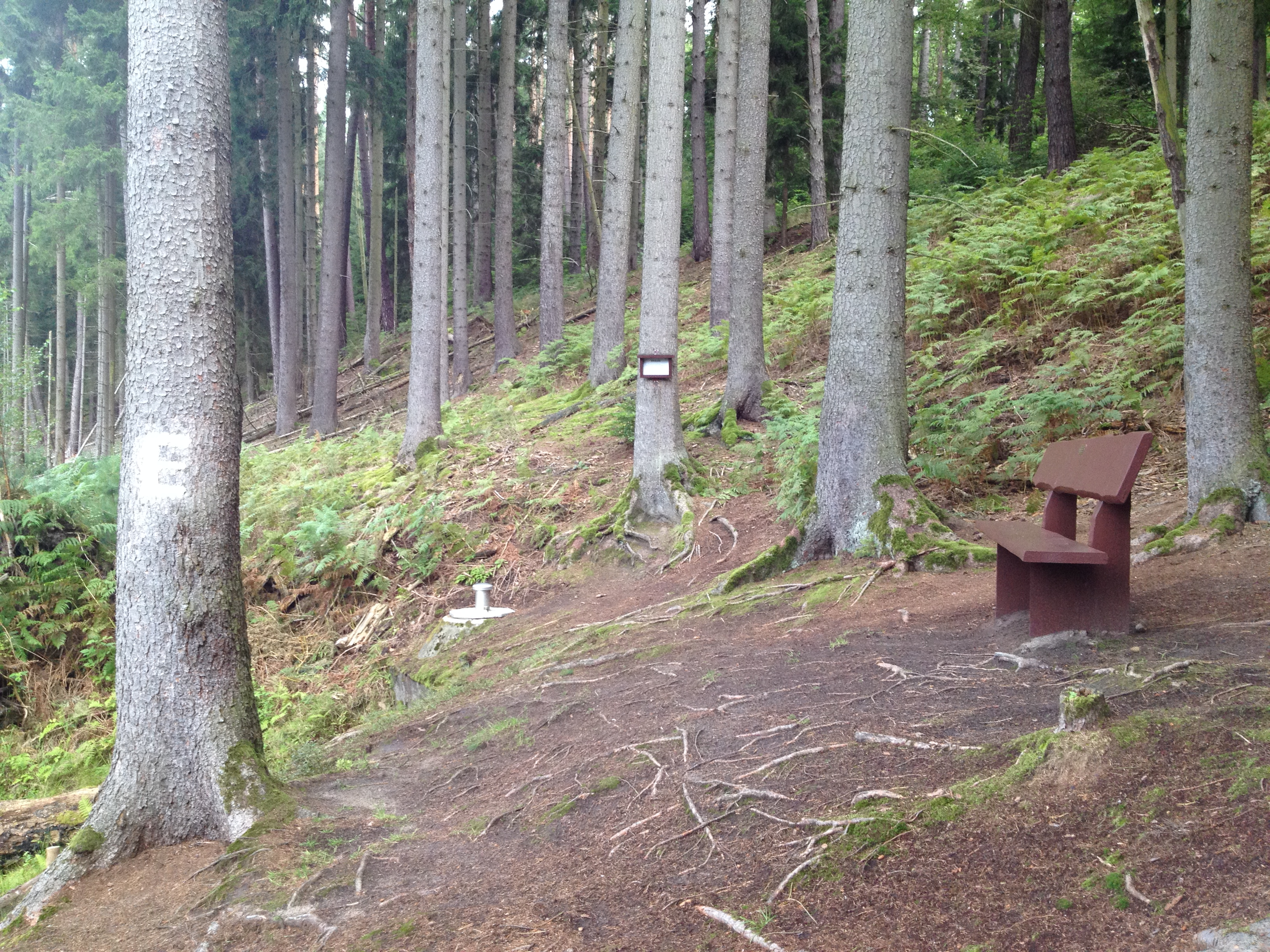 Die Elbequelle südöstlich von Freienhagen im Langen Rod in der Nähe des Kassel-Edersee-Radwegs